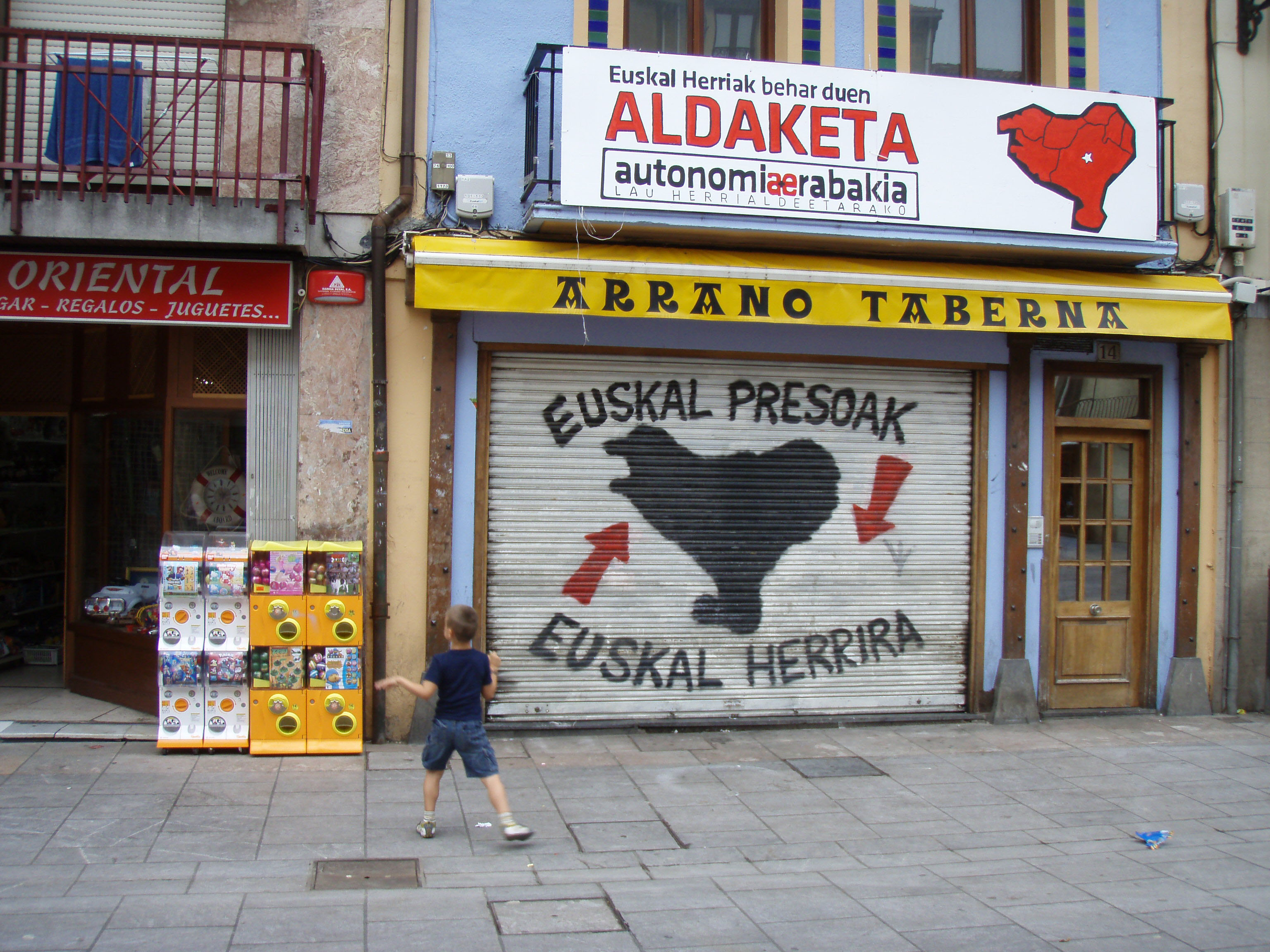 Exterior de una Herriko Taberna en Zarauz (provincia de Guipúzcoa).